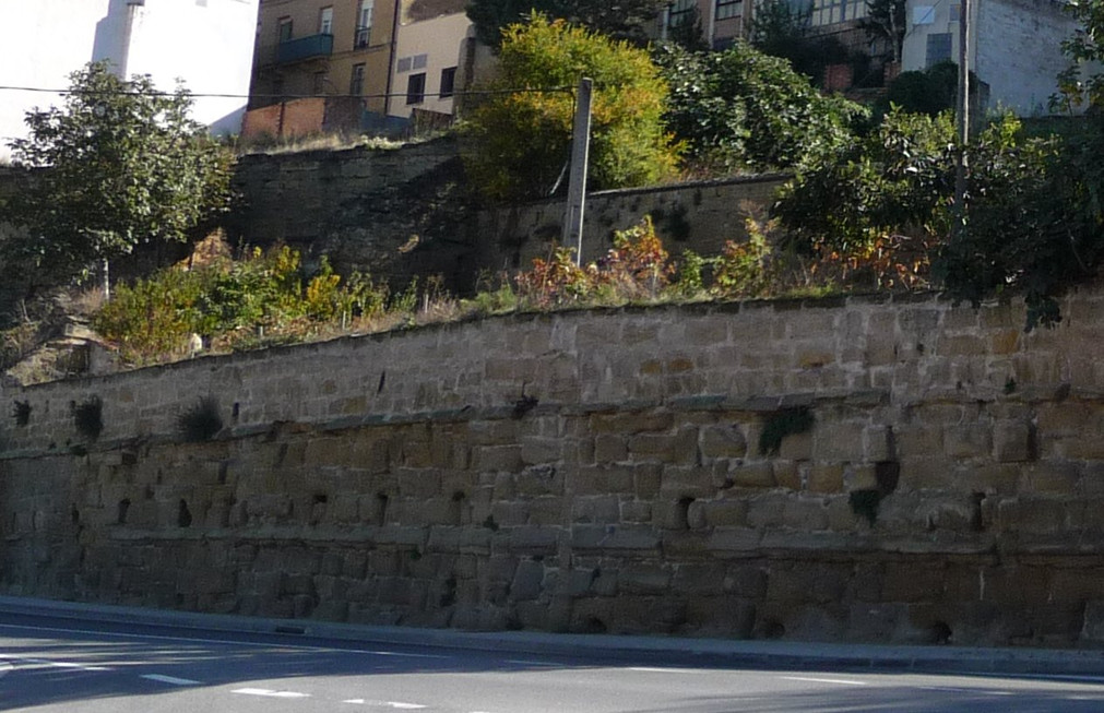 Muralla y zona llamada El Palomar en Haro, La Rioja